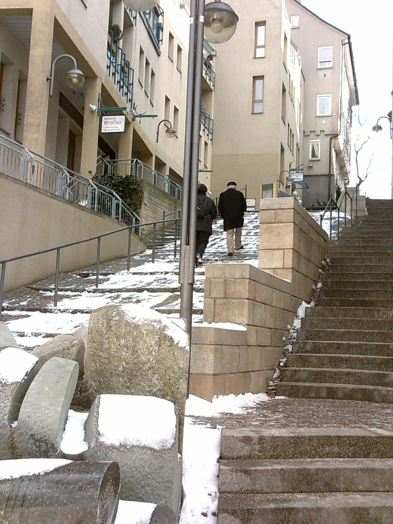 Treppenreiches Böblingen, selbst fotografiert, März 2006